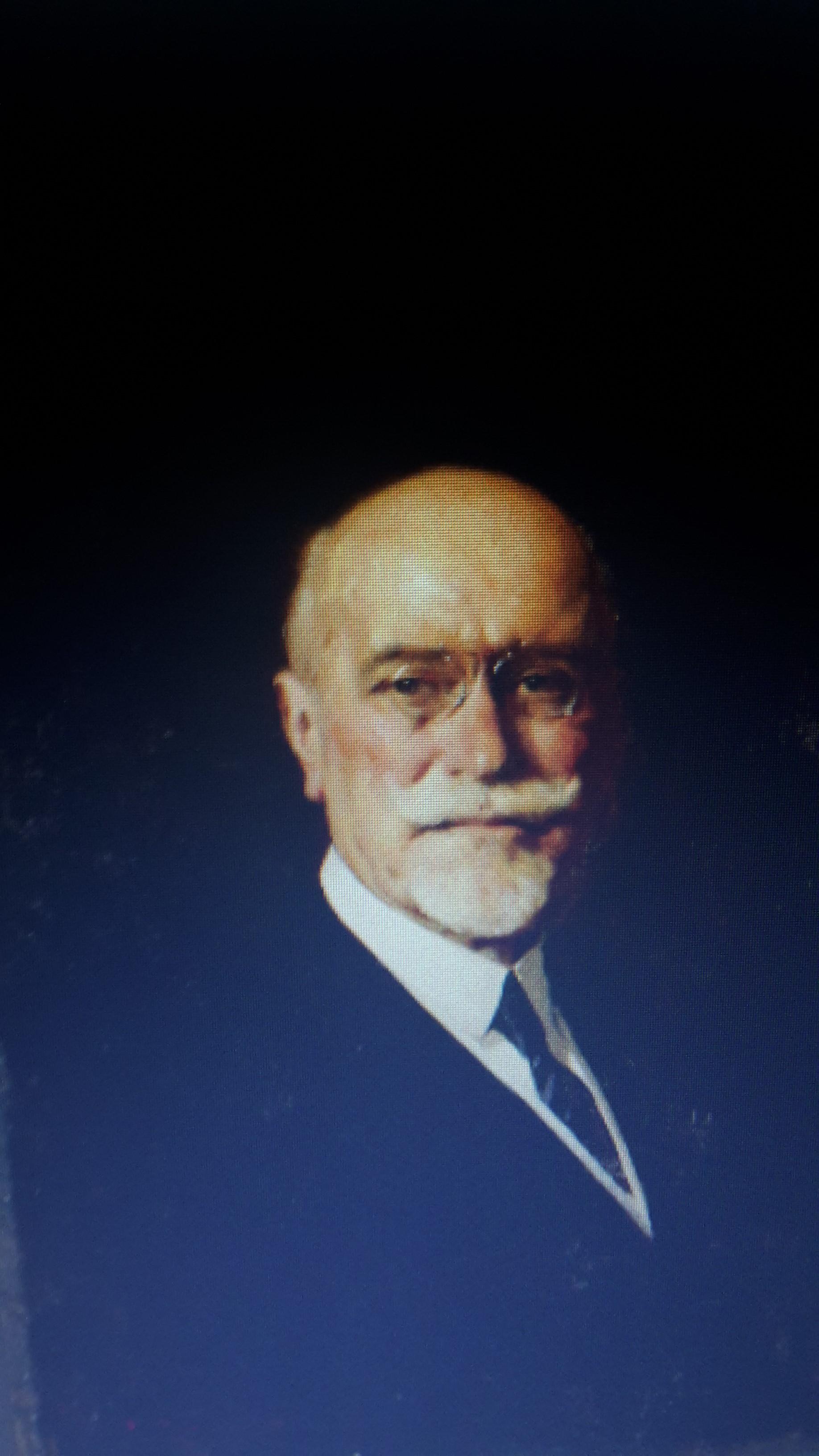 Luigi Broggi, ritratto